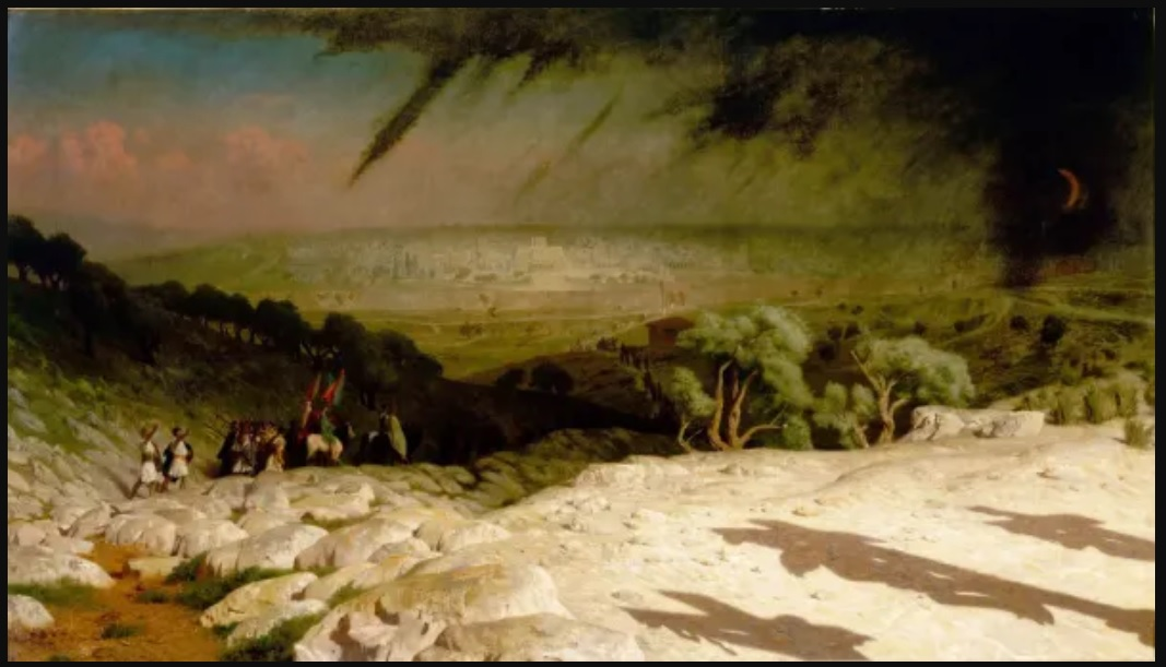 ציור גולגותא